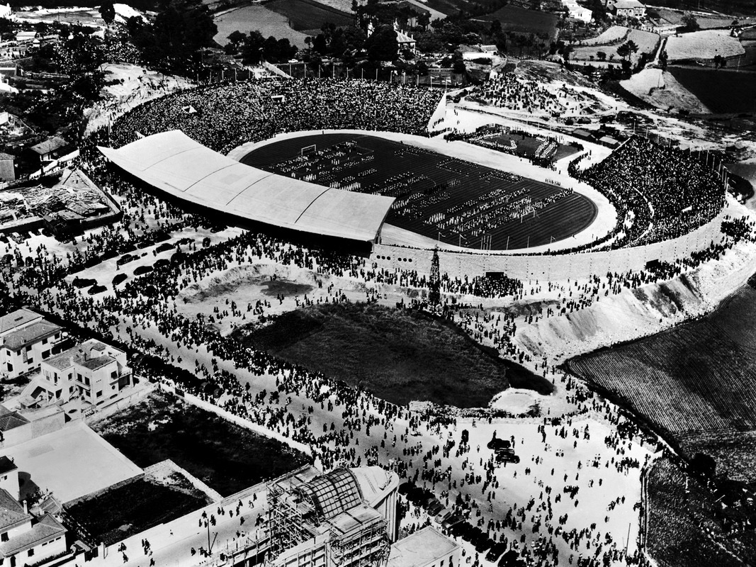 10 - Inauguração do Estádio das antas a 28 de Maio de 1952